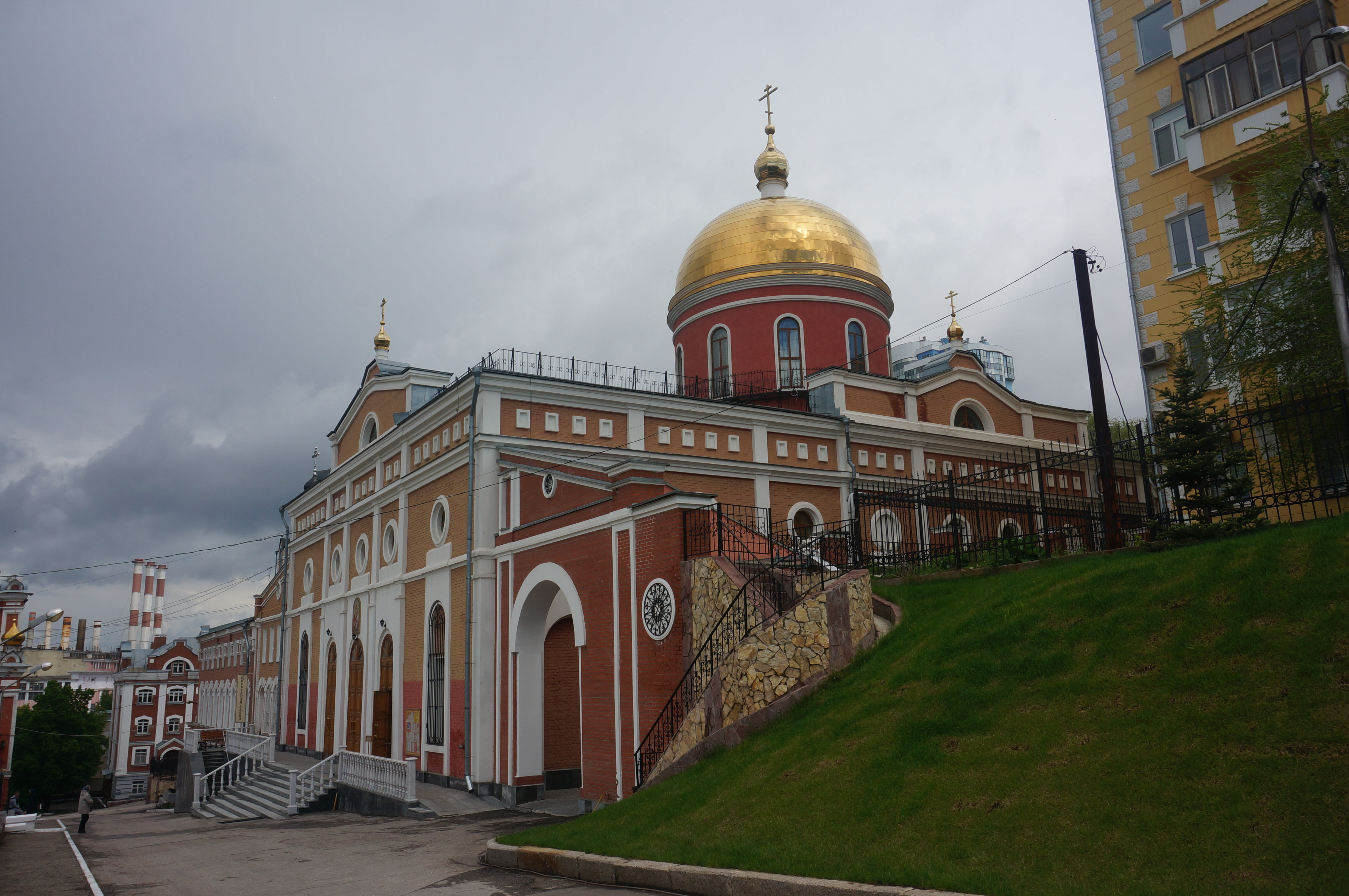 Иверский женский монастырь, Самара, Россия